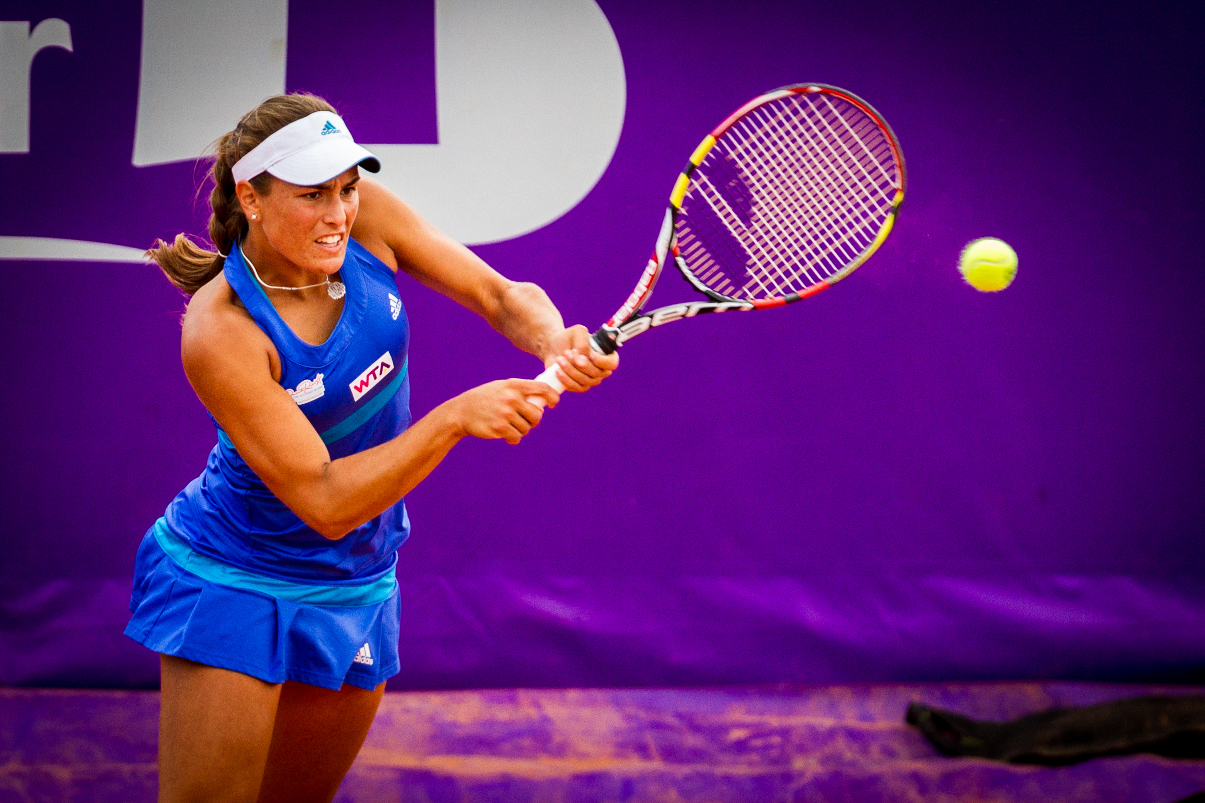 Mónica Puig, née le 27 septembre 1993 à San Juan, est une joueuse de tennis porto-ricaine.